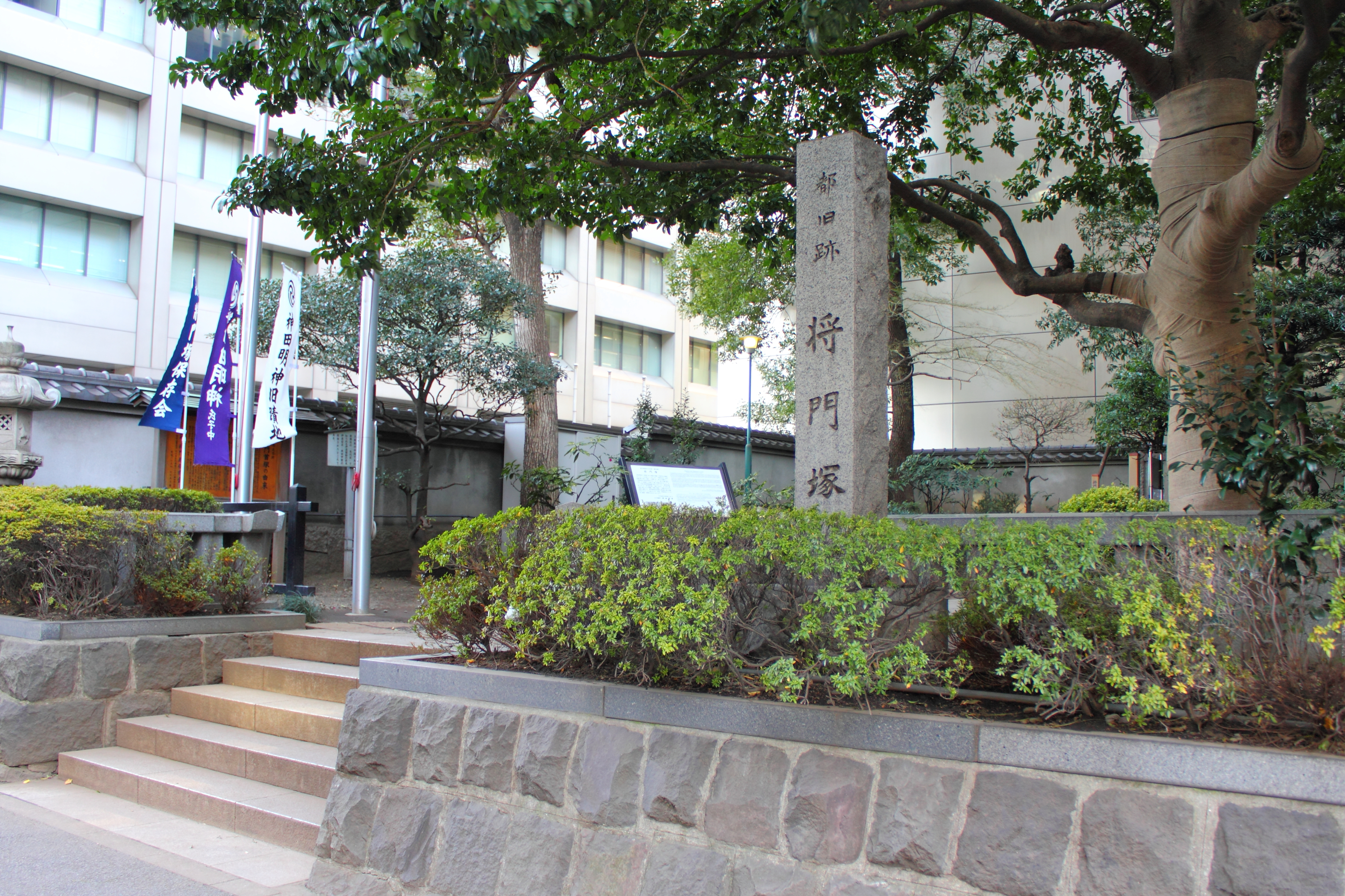 平将門の首塚（東京都千代田区大手町）